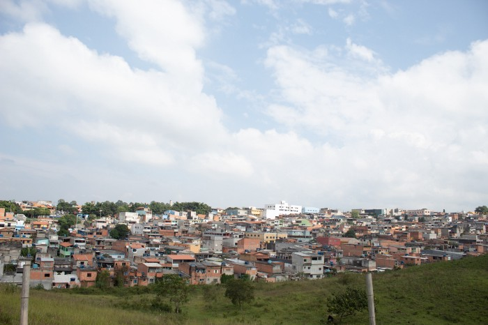 Vista geral do bairro Ponte Alta